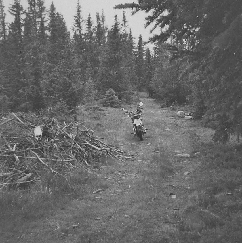 Varpet som lå ved sætervegen ved Ohovdet på Vest-Torpa